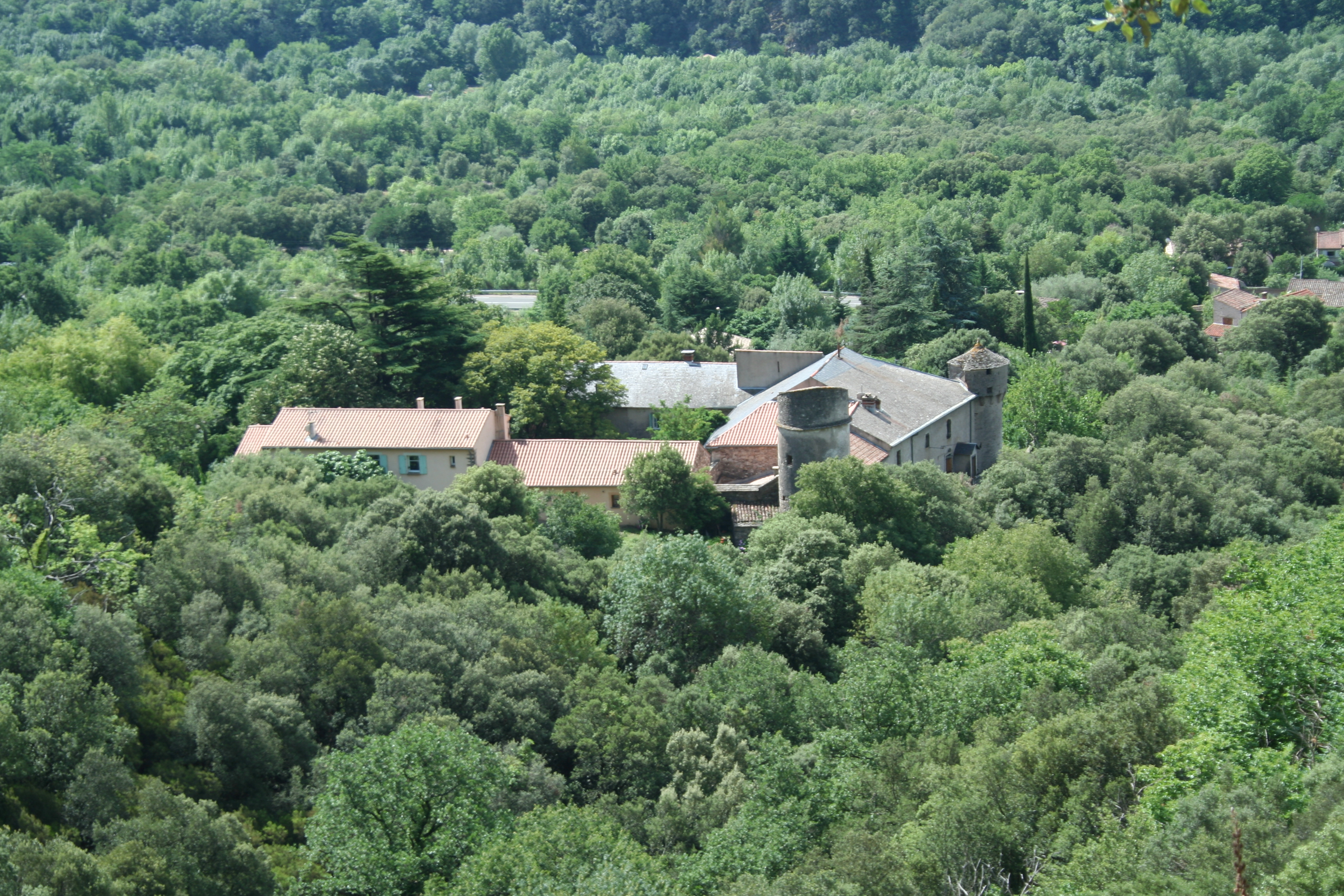 Colombières-sur-Orb (Hérault) - vue générale sur le château